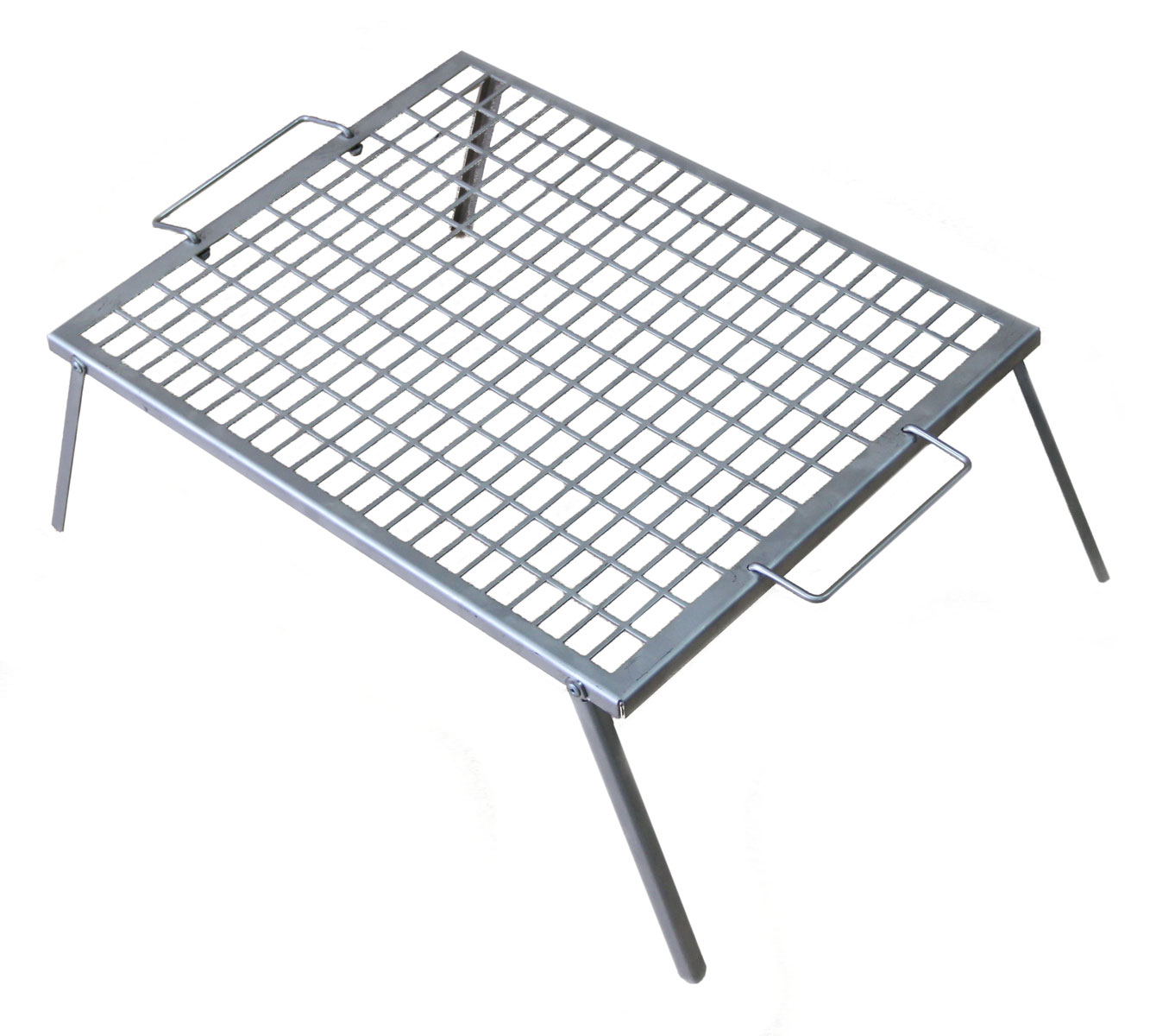 Решетка для гриля GrillBox